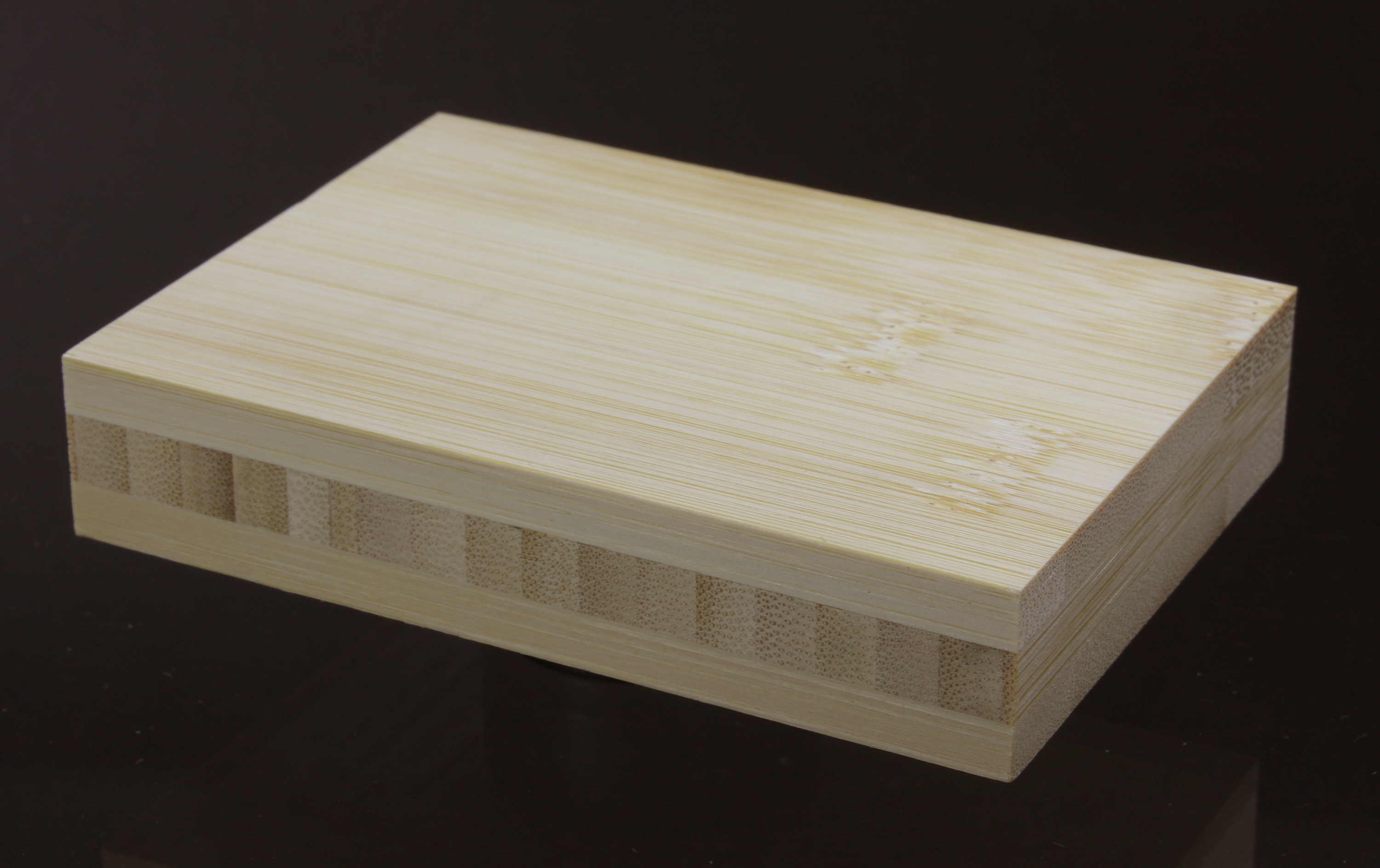 Bambusstäbchen, hell